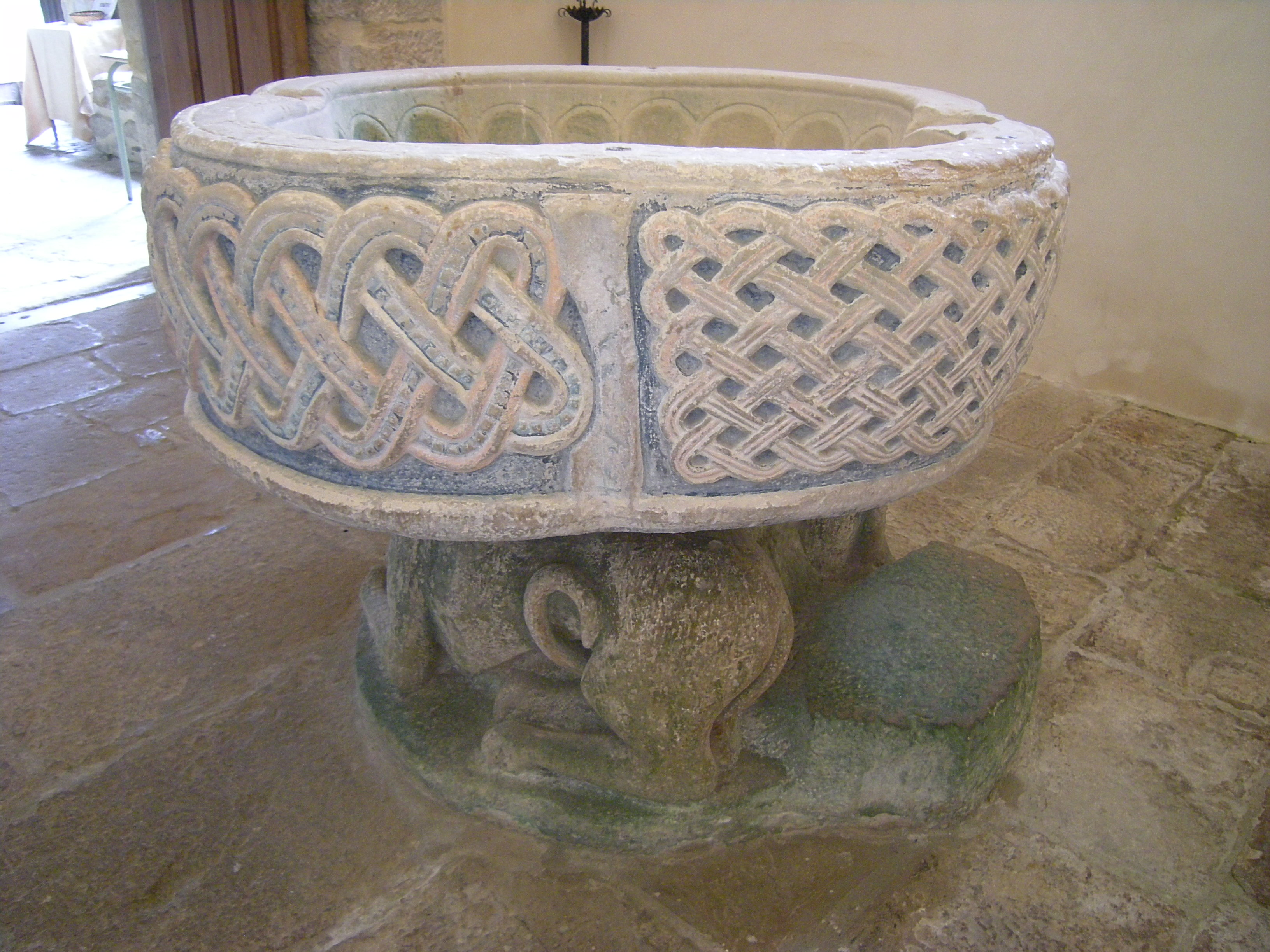 Pila bautismal de la iglesia de Santa María de Bareyo (Cantabria, España).